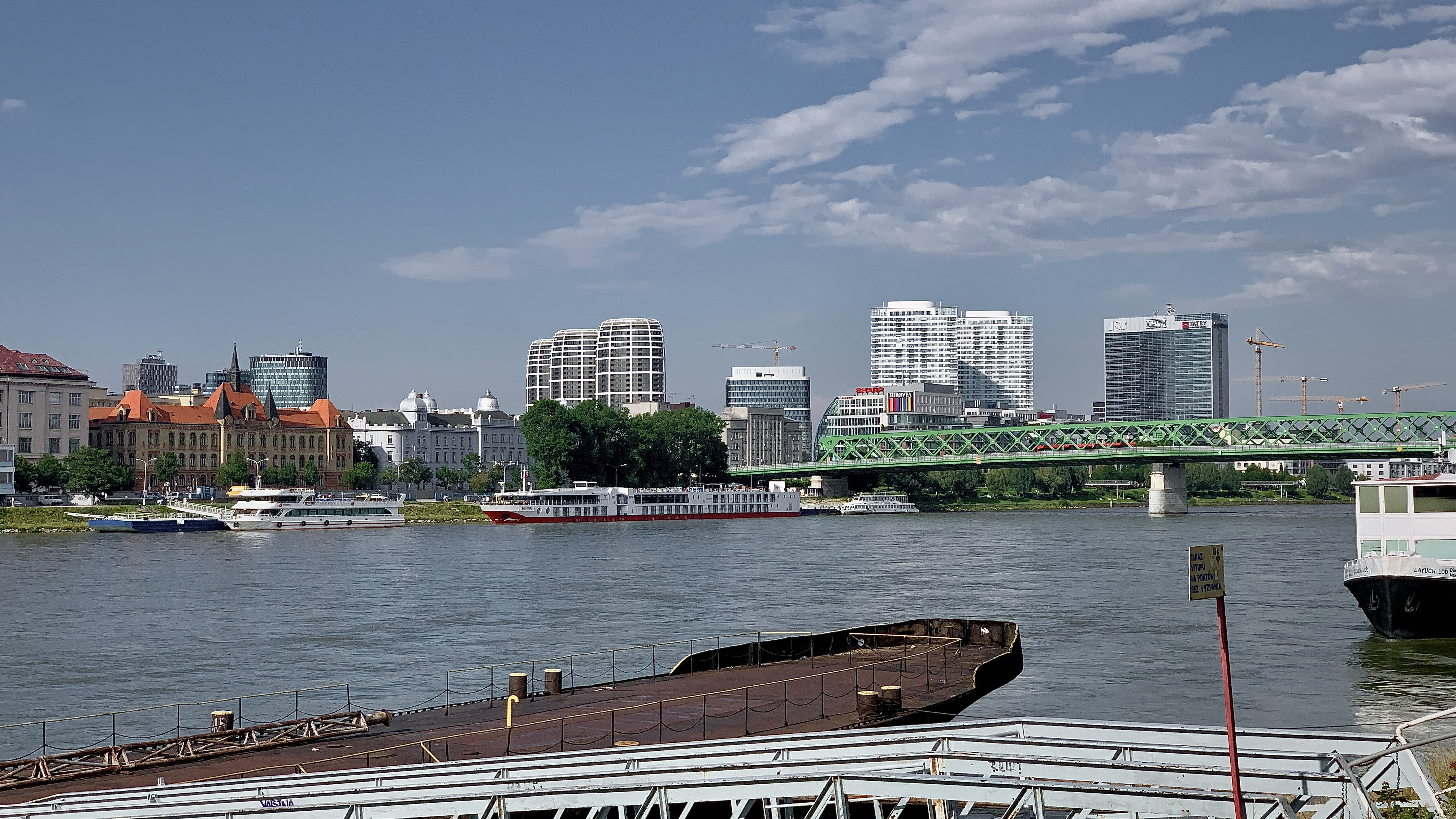 Nové Nivy